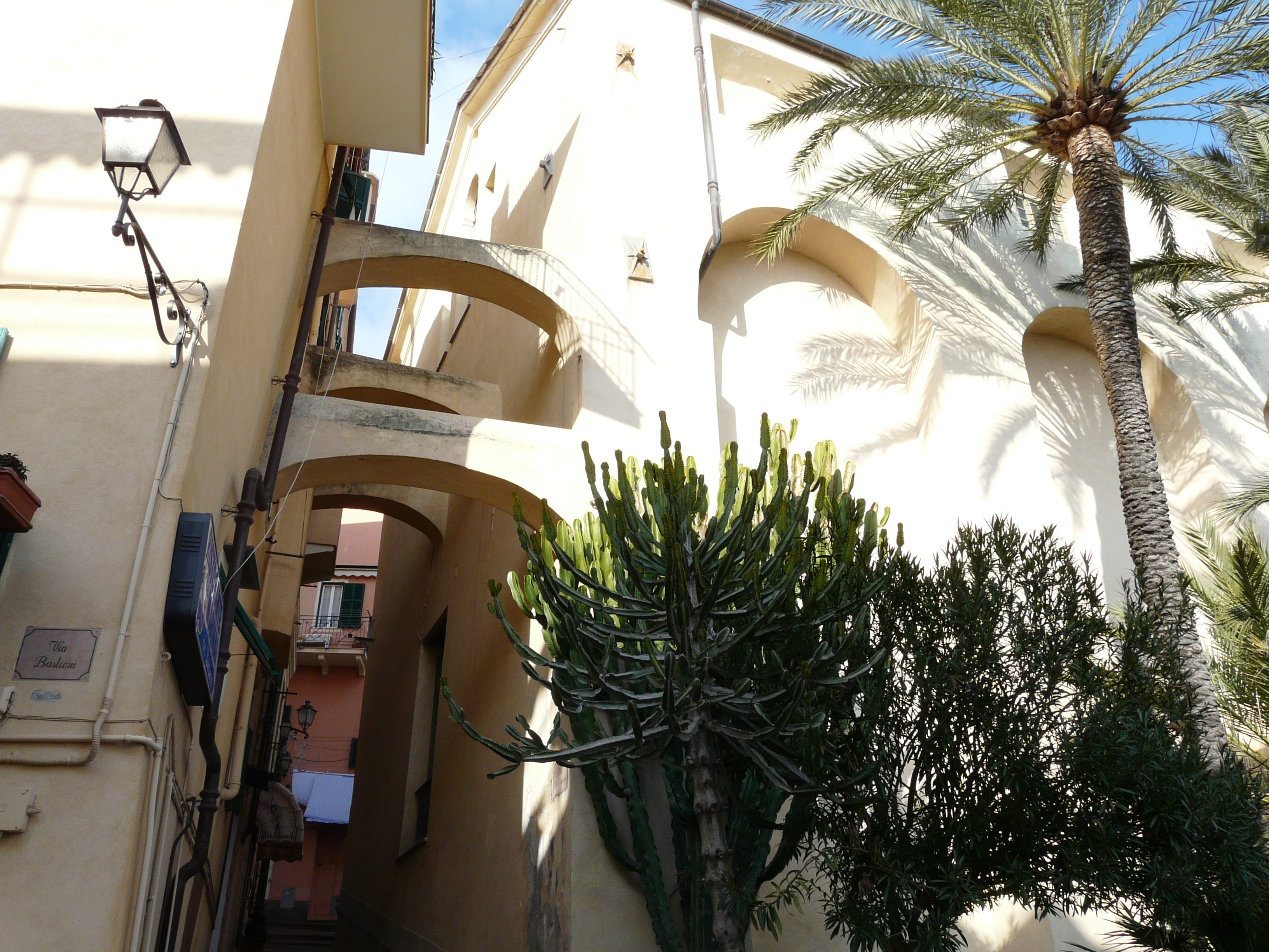 Centro storico di Bordighera, Liguria, Italia